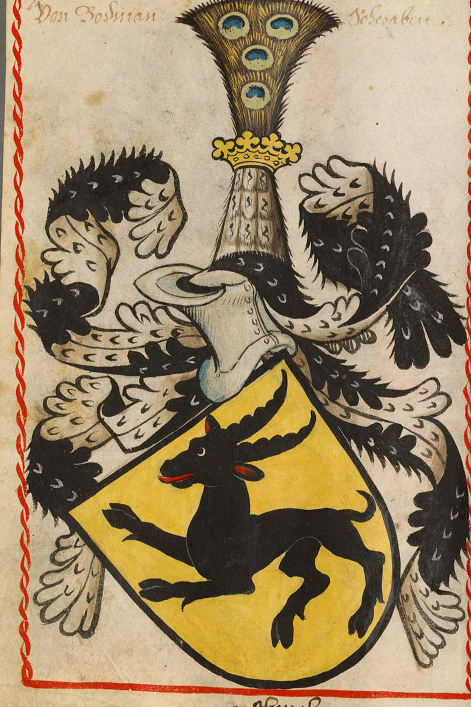 Scheibler'sches Wappenbuch, älterer Teil Bodmann